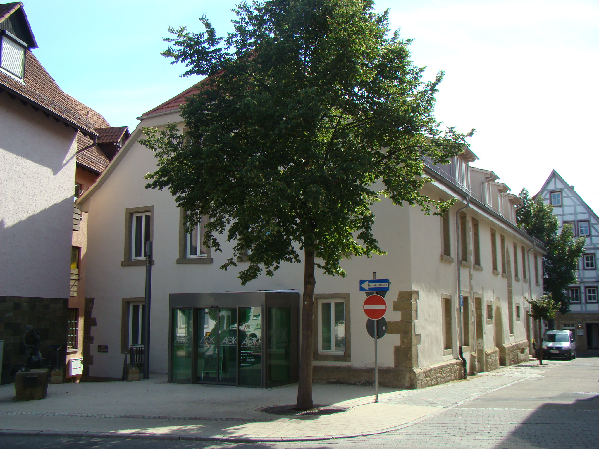 Diakonat in Eppingen, ehem. Sakralbau, nach Sanierung